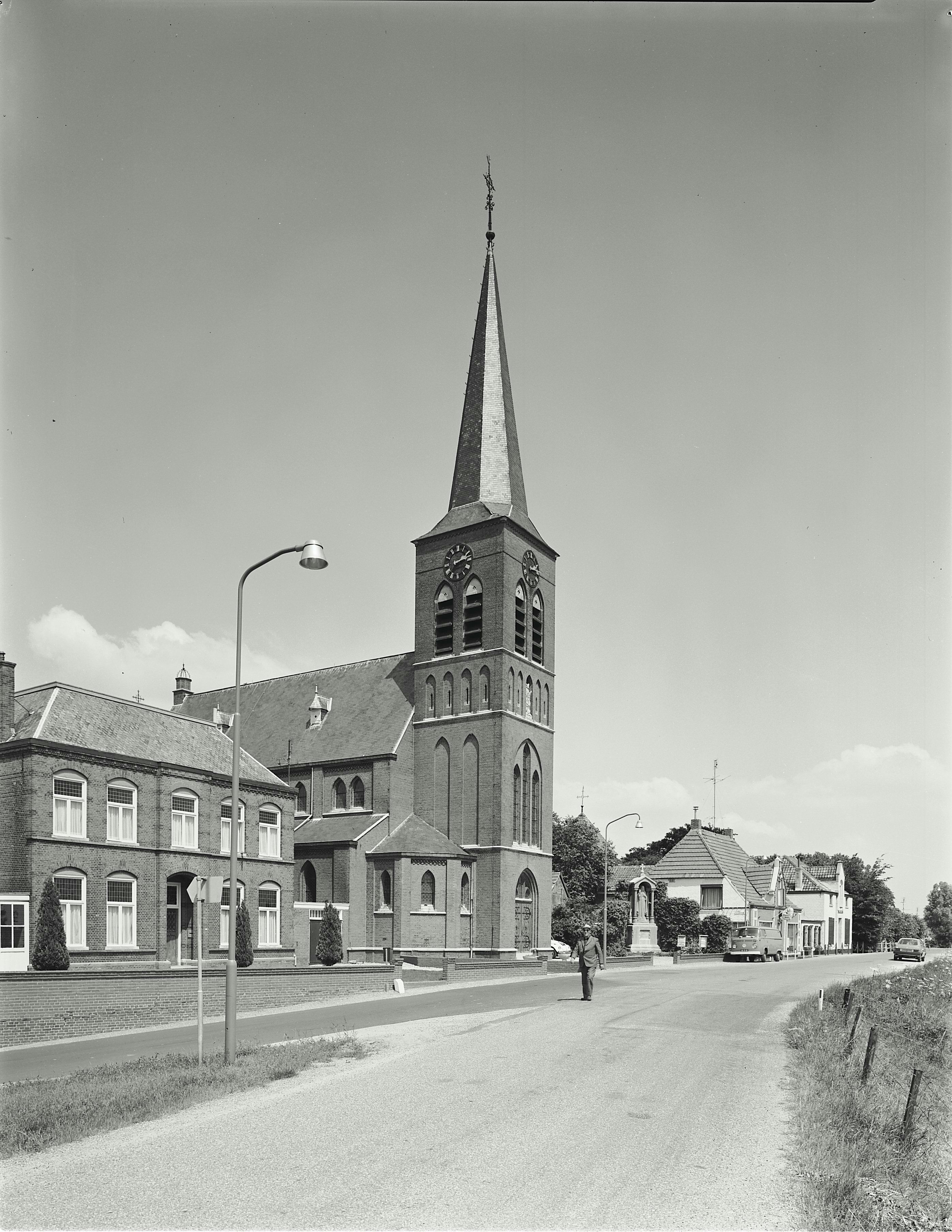 Rooms-katholieke Kerk van Sint Servatius: Overzicht van de kerk aan de Maasdijk (opmerking: Gefotografeerd voor de geïllustreerde beschrijving: Het Land van Maas en Waal, door A.G. Schulte, bladzijde 329)